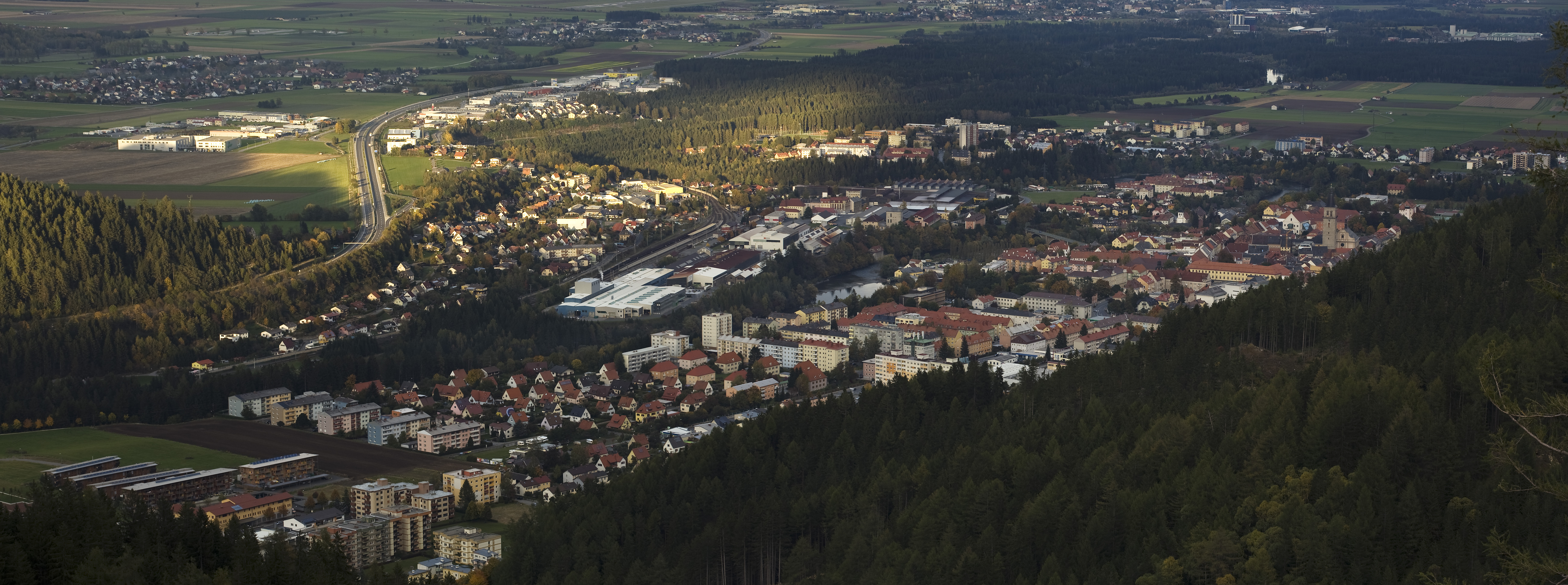 Blick auf die Stadt Judenburg von Südwest(Grünhübl),mit den Ortsteilen Strettweg und Murdorf.